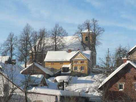 Kostel Rozeslání apoštolů (Písařov)